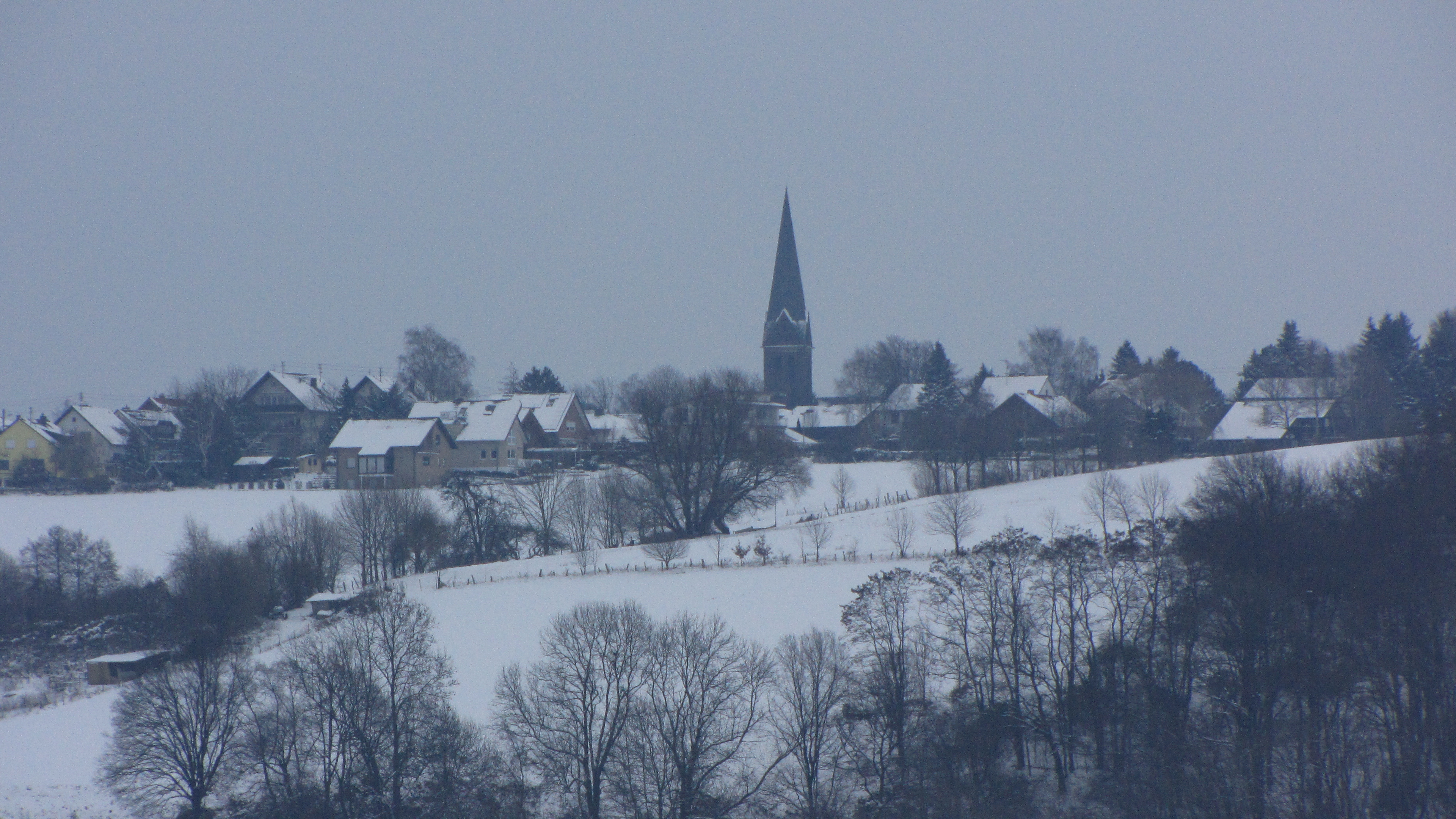 Blick auf Rott, Hennef (Sieg) von den Feldern nördlich von Bockeroth aus